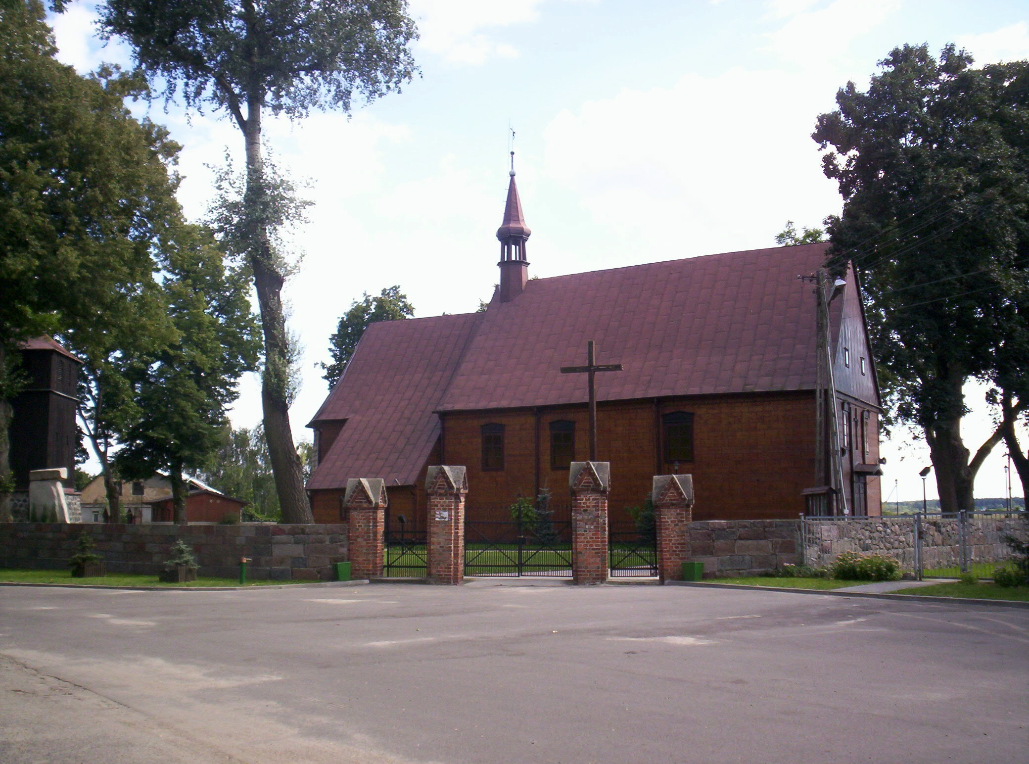 Pęczniew, ul. Rynek 12 - kościół parafialny pw. św. Katarzyny. Autor: Avalokitesvara